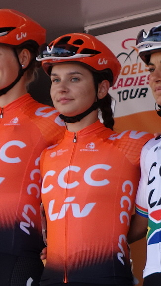 Agnieszka Skalniak (CCC-Liv) bij de start van de eerste etappe van Stramproy naar Weert in de Boels Ladies Tour 2019